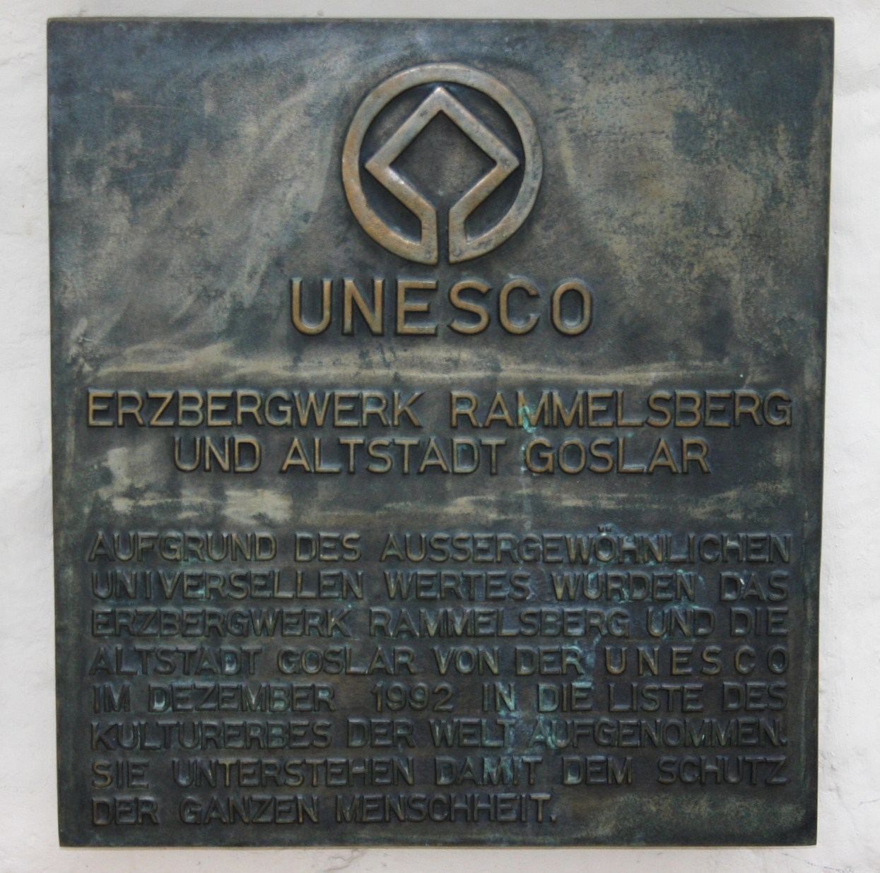 Auszeichnung UNESCO Weltkulturerbe